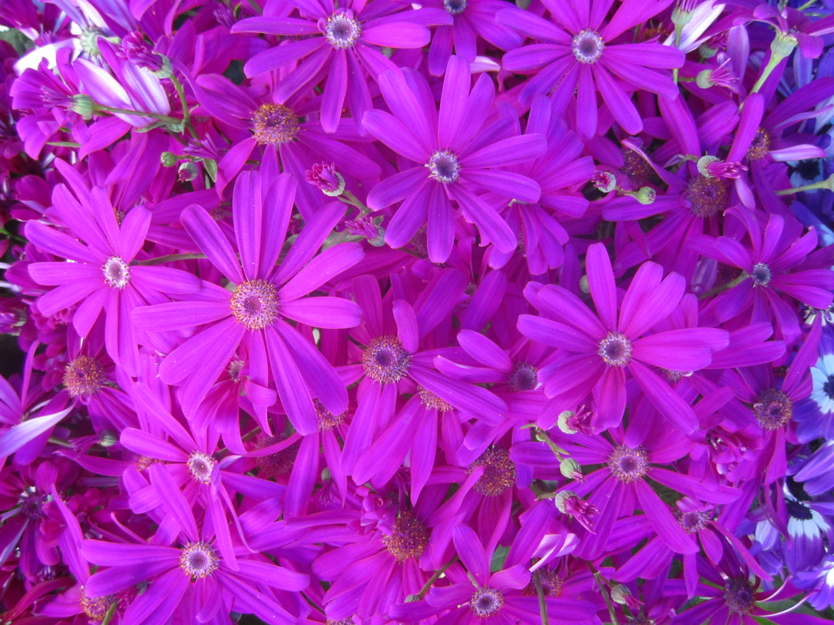 گل سینره